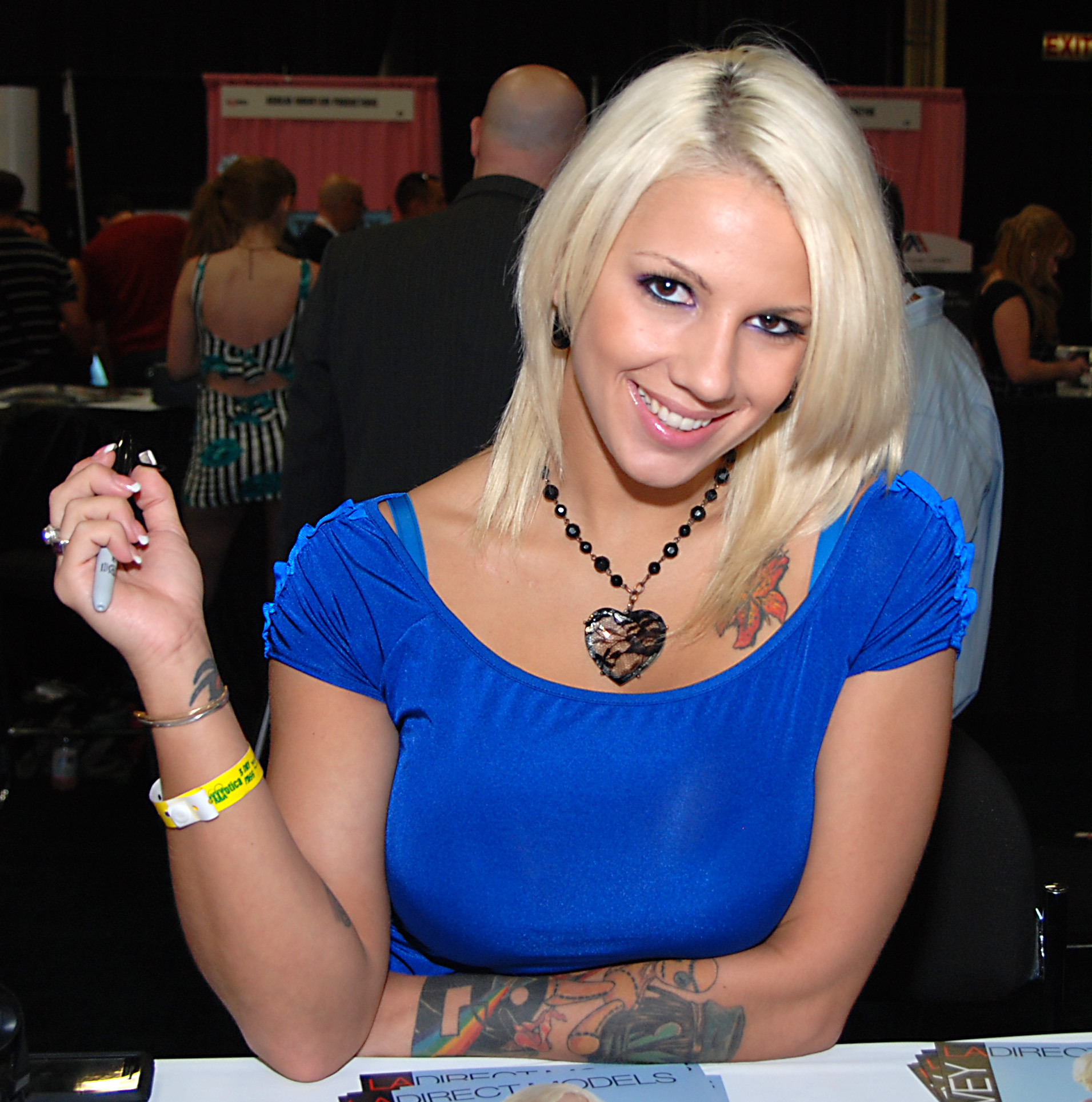 DSC_0221A